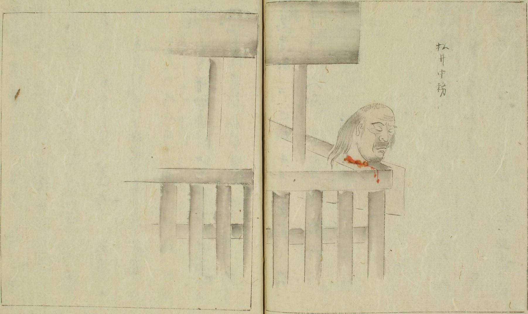 松井中務 早稲田大学図書館所蔵『風説都之錦』後編巻之ニ「松井中務梟首之事并図」